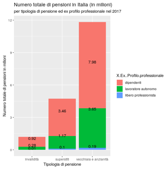 File realizzato con RStudio usando dati Istat